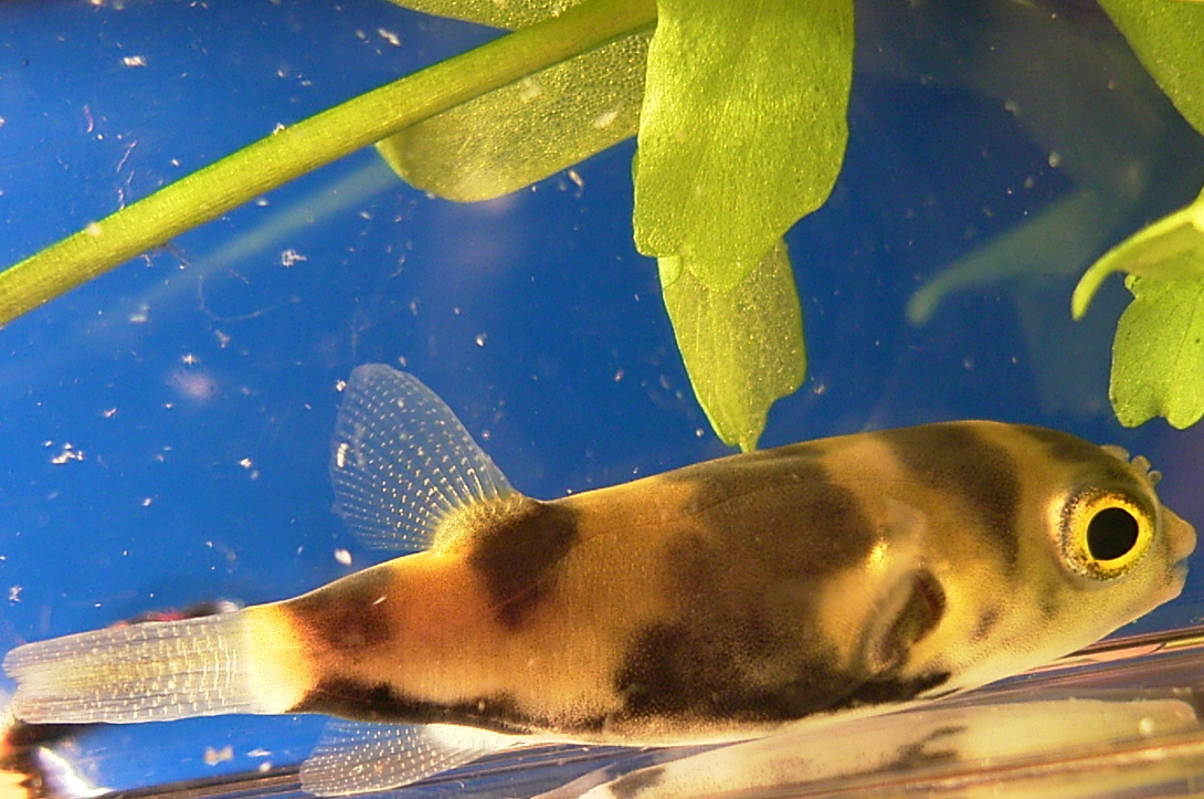 Assel-Kugelfisch fotografiert am 28.10.2004 also selbstgemacht und zur Verfügung gestellt --Oliver s. 19:43, 28. Okt 2004 (CEST)